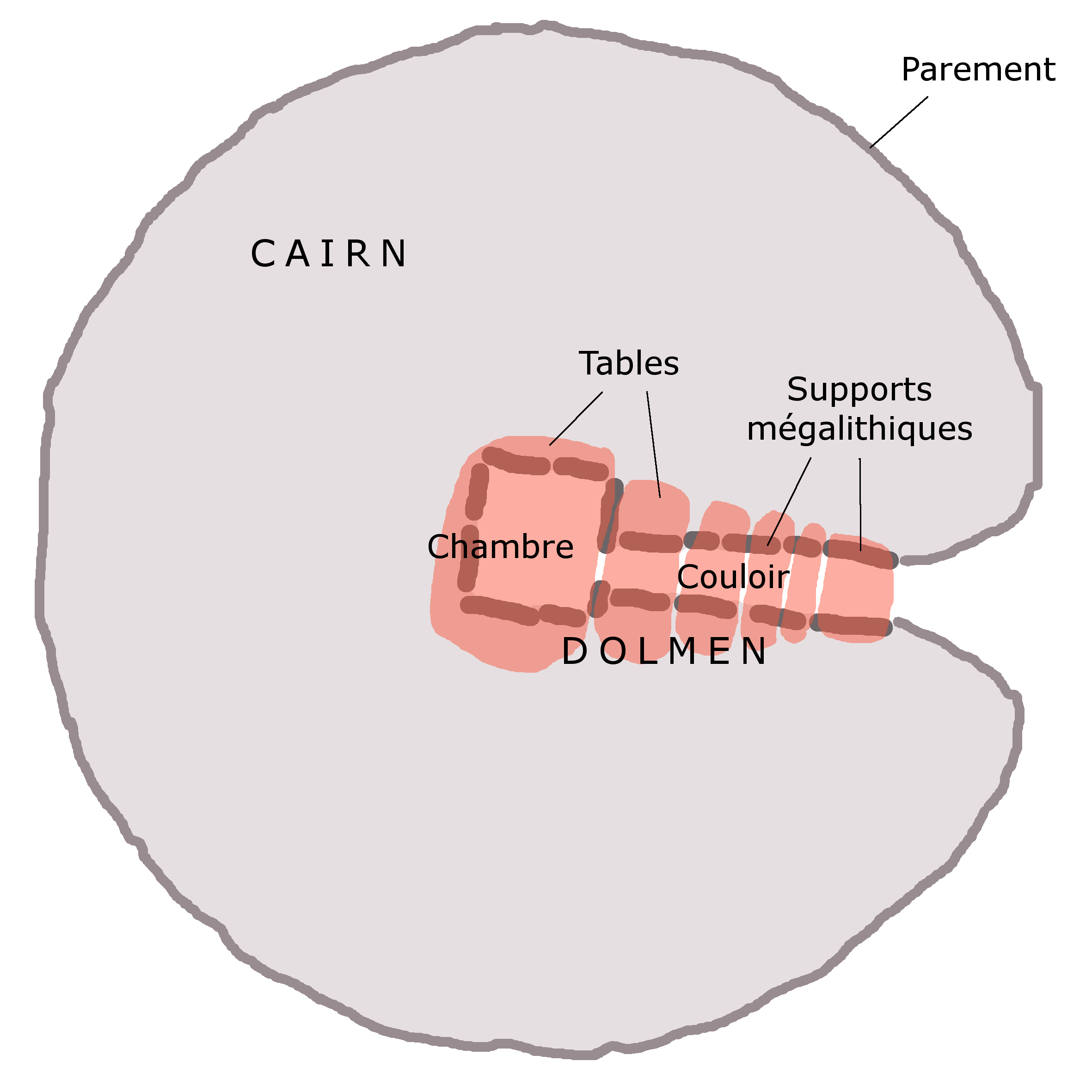 Plan du cairn de Kercado, à Carnac, Morbihan, Bretagne. D'après Zacharie Le Rouzic, 1927. Classé monument historique le 27 décembre 1923.